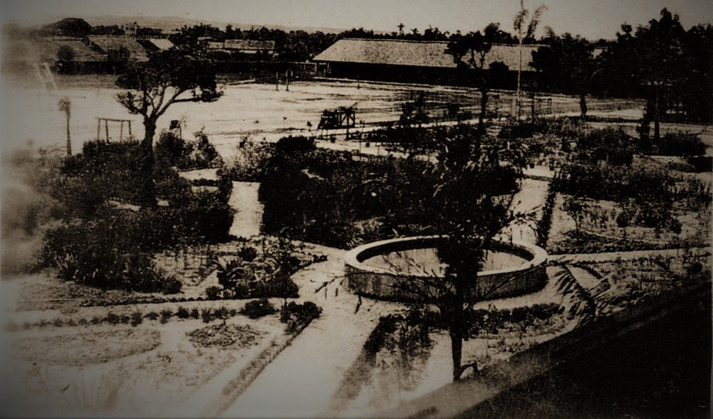 中文（台灣）: 台中二中史料